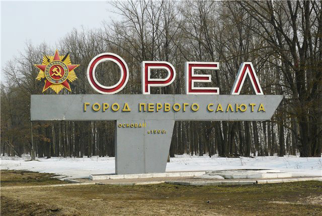 Стела в честь наименования г.Орла - городом Первого салюта на южной окраине города.